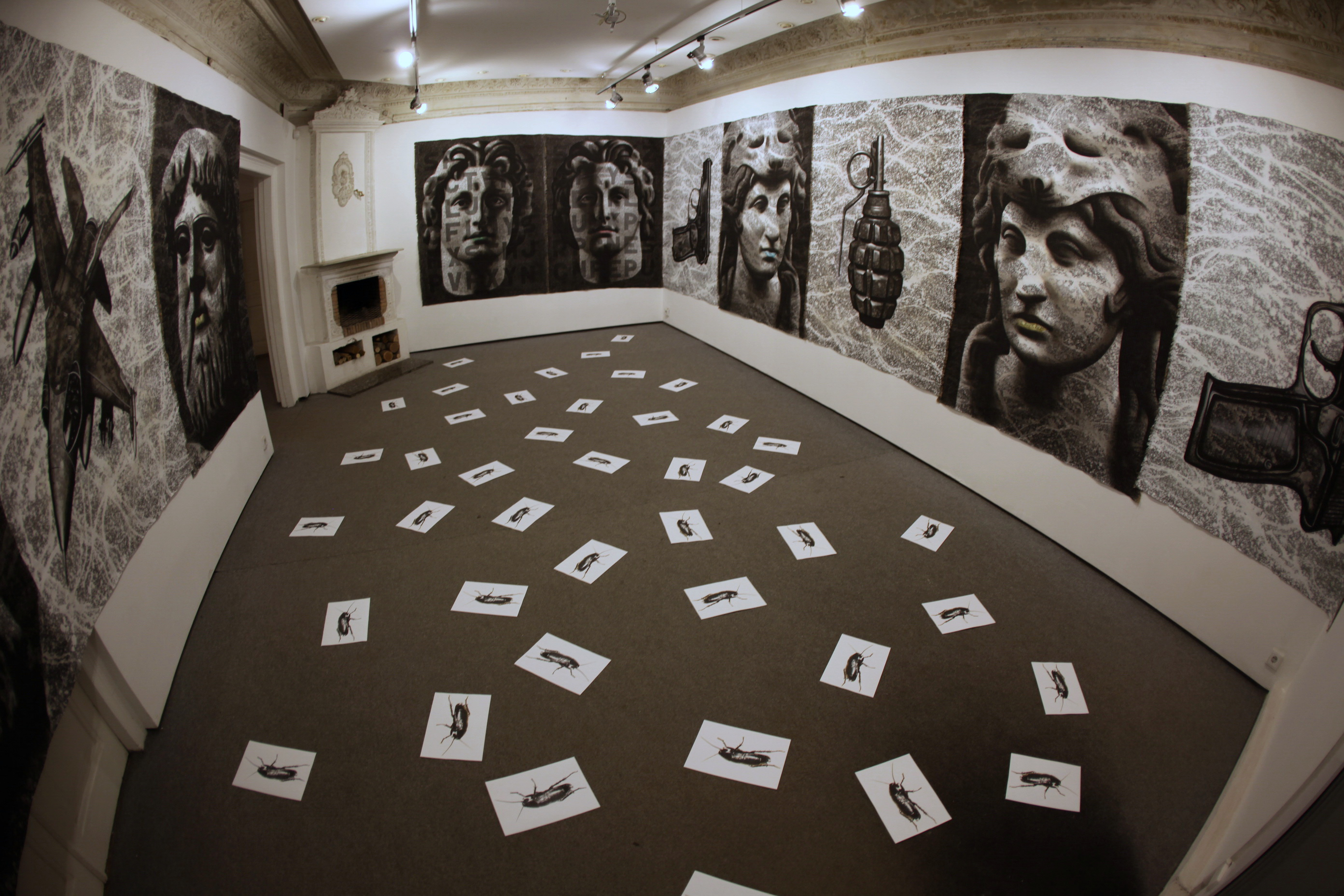 Володимир Яковець "Генії і таргани", 2015